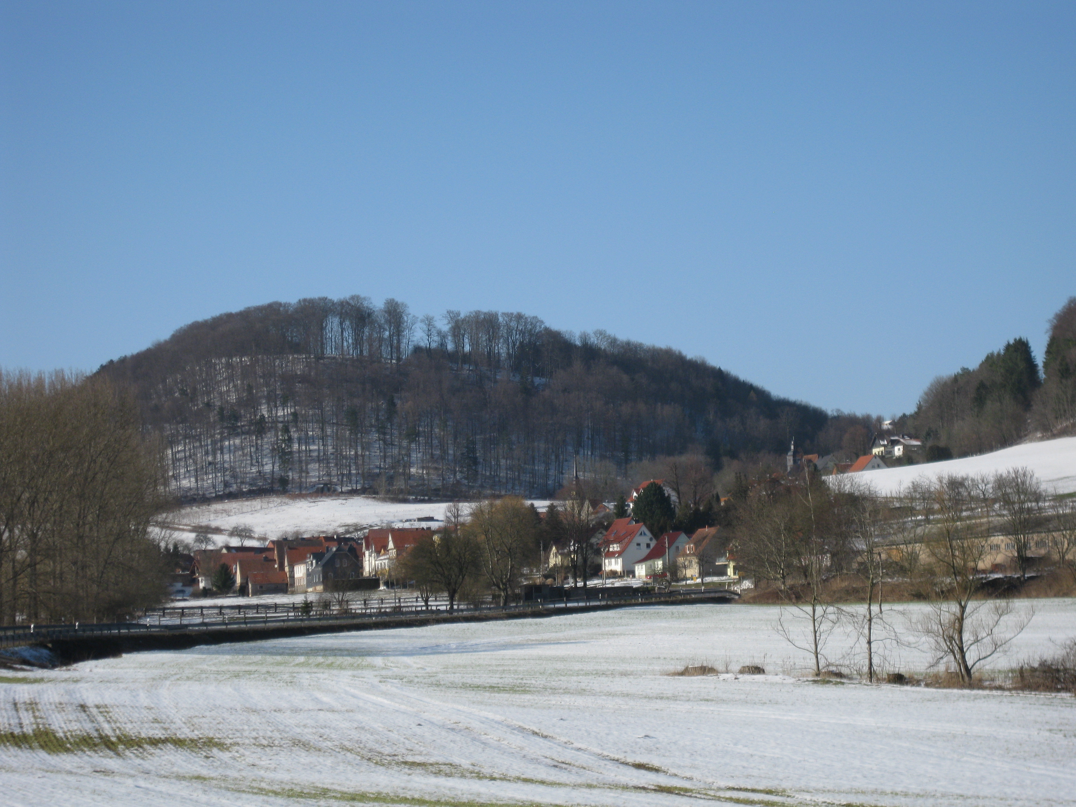 Bernterode im Südeichsfeld (im Hintergrund der Eichenberg)